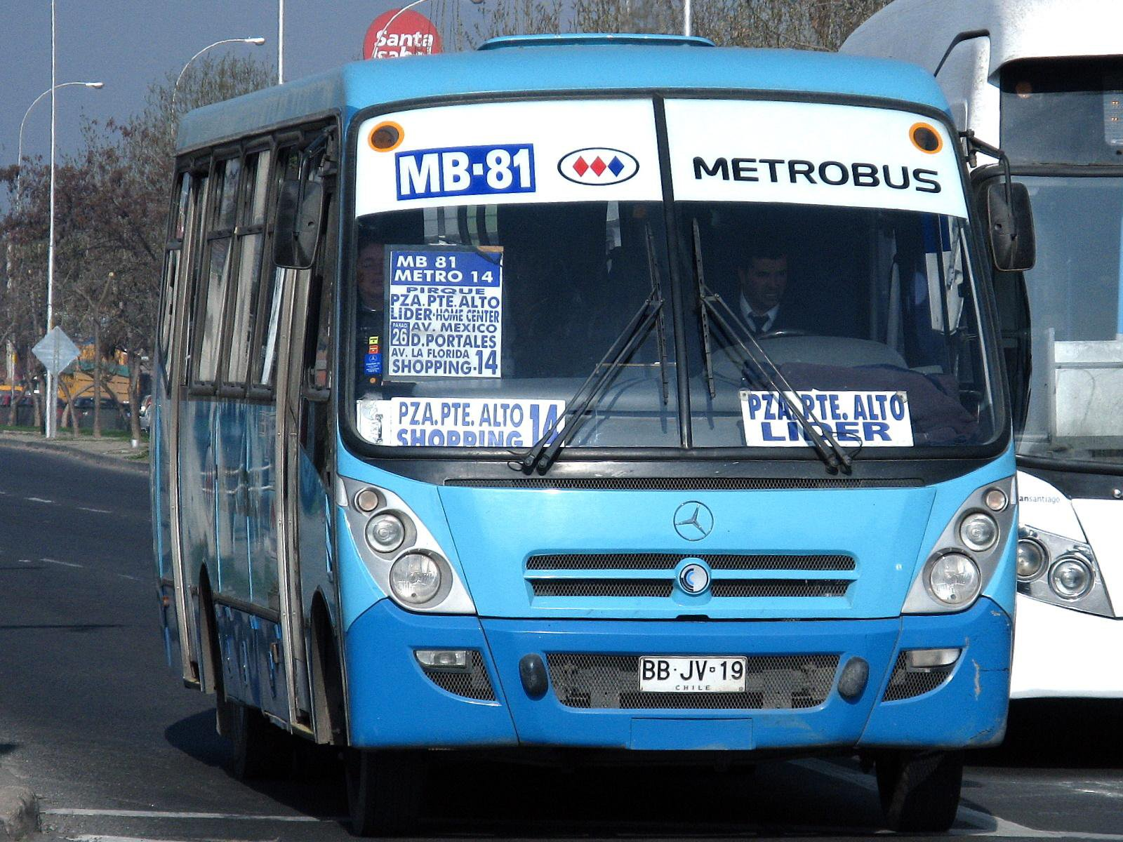 Recorrido Metrobús Nº81 circulando en Santiago (Chile)